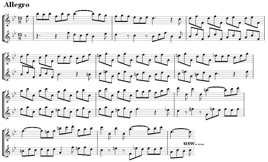 komt van , onder GFDL vrijgegeven. auteur: :de:Benutzer:Mussklprozz met de tekst: Gigue Auszug aus: 6 Sonaten von Georg Philipp Telemann, veröffentlicht 1727 in Hamburg, Sonata Nr. 2, Allegro Gesetzt von Mussklprozz am 29. Januar 2005